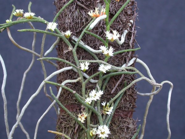 Campylocentrum ornithorrhynchum - São Paulo